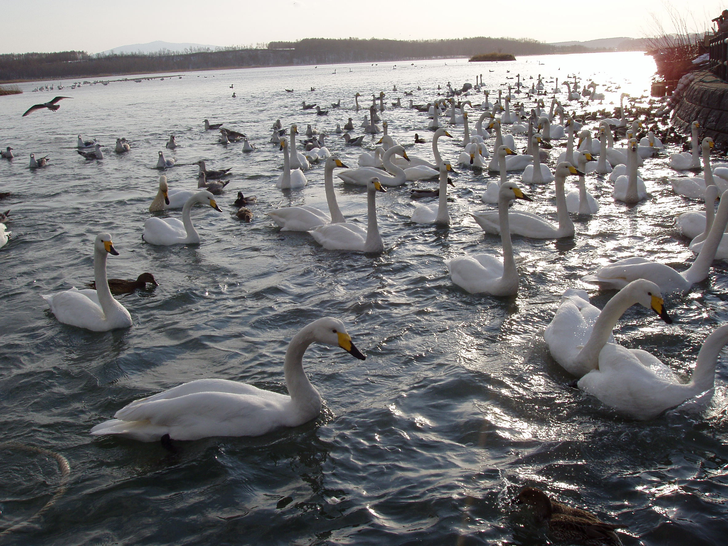 冬の濤沸湖